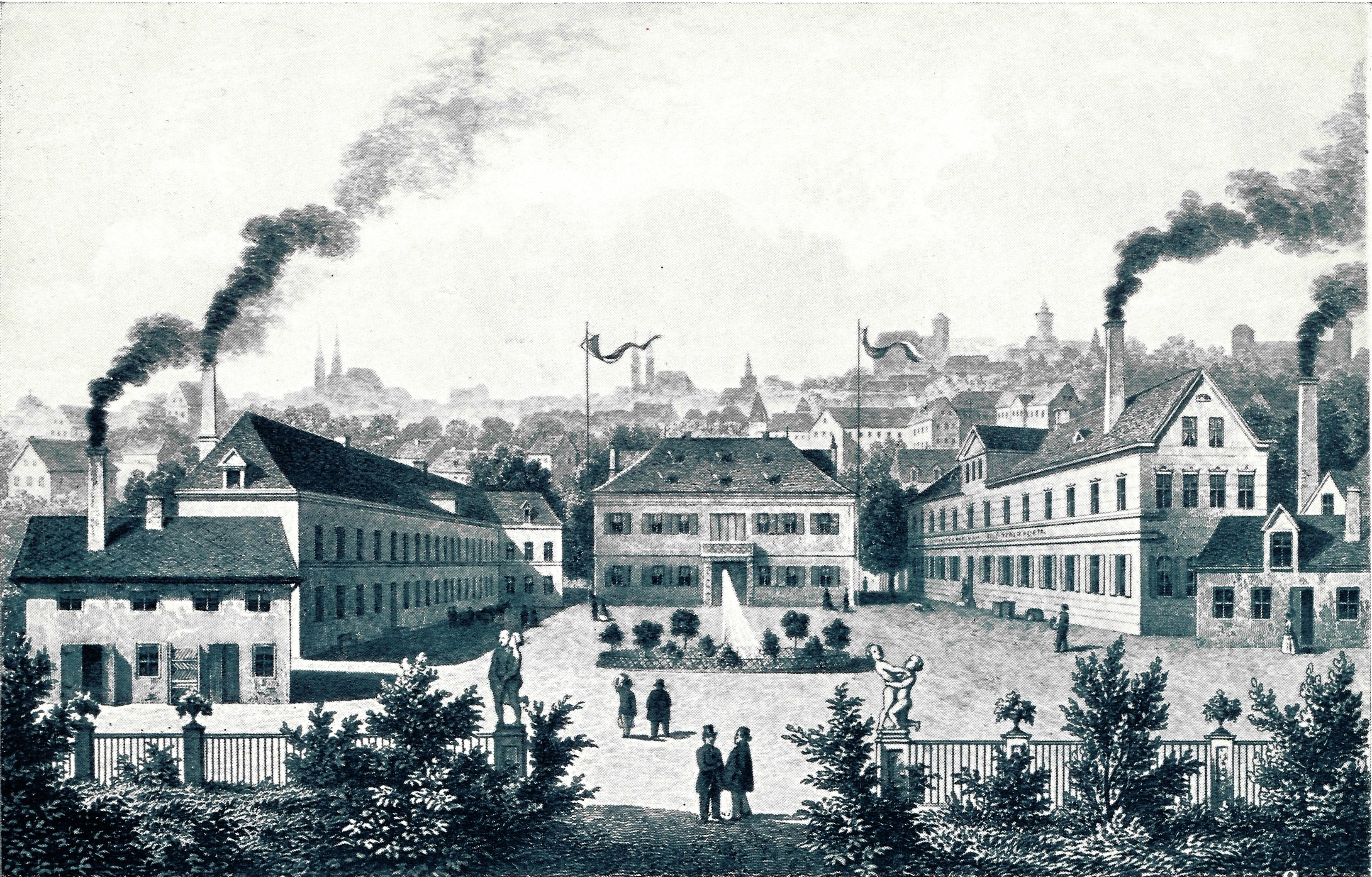 Fabrik von J.S. Staedtler, seit 1854 in Nürnberg Hadermühle 23 b and Flaschenhof 31-34 errichtet. Der schwarze Rauch stammt von einer Dampfmaschine, die die Maschinen der Fabrik antrieb. Im Hintergrund die Silhouette des mittelalterlichen Stadtzentrums von Nürnberg The black smoke is caused by a steam engine that propelled the plants machinery and equipment. In the background the skyline of Nuremberg's medieval city center.